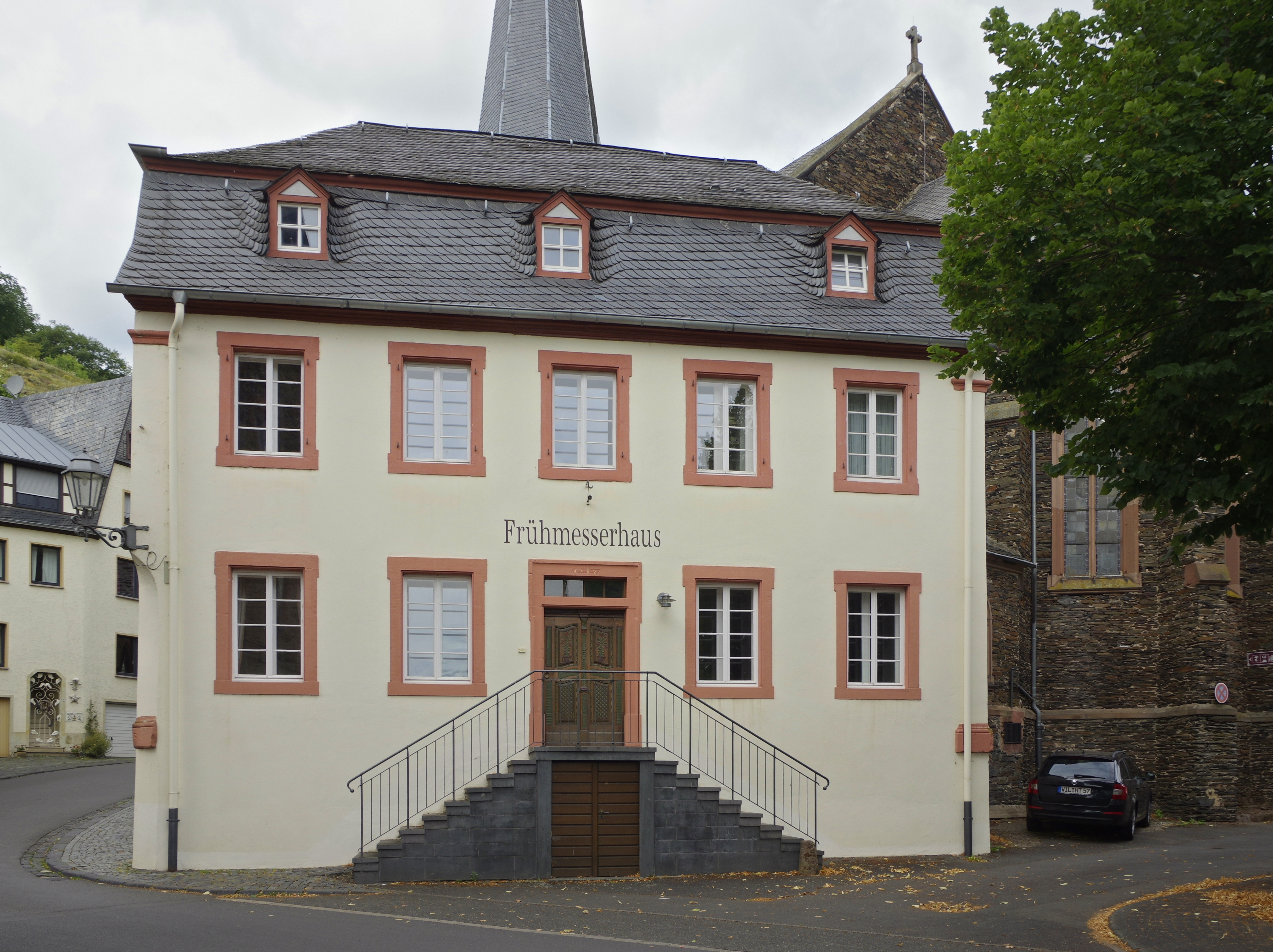 Ürzig, St. Maternusstraße, zu Nr. 5, Katholisches Pfarrhaus